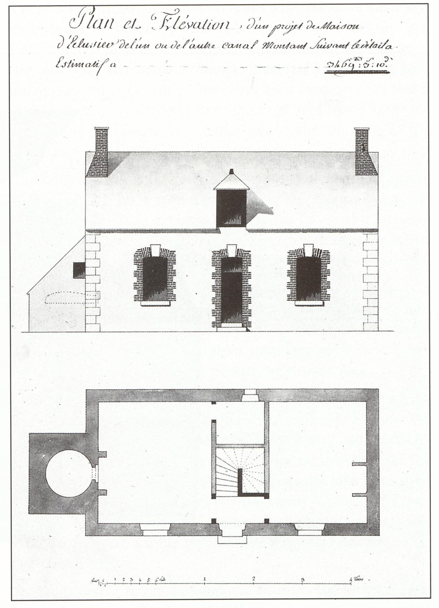 Canal d'Orléans - Plan d'une maison éclusière